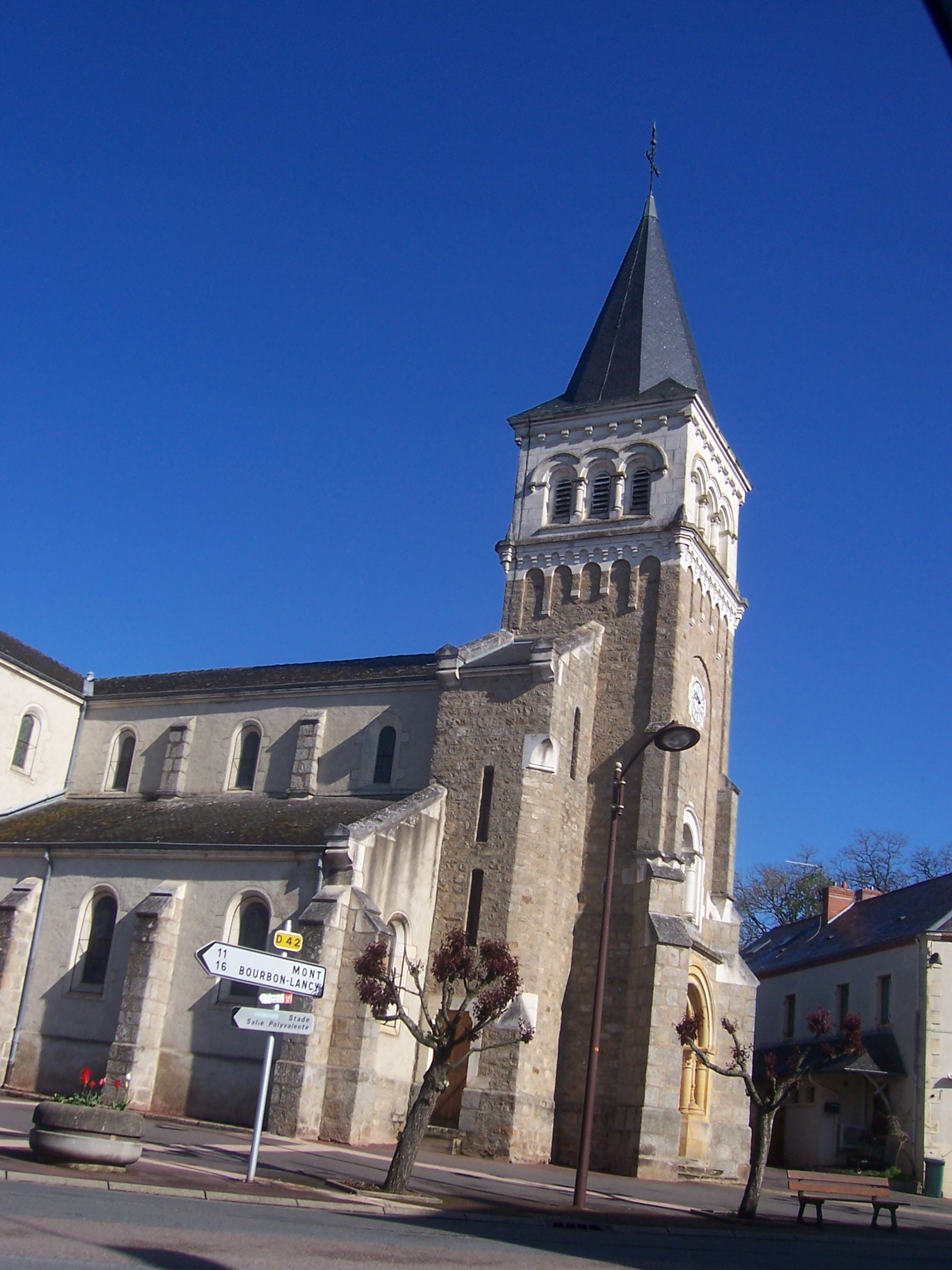 Eglise de Grury